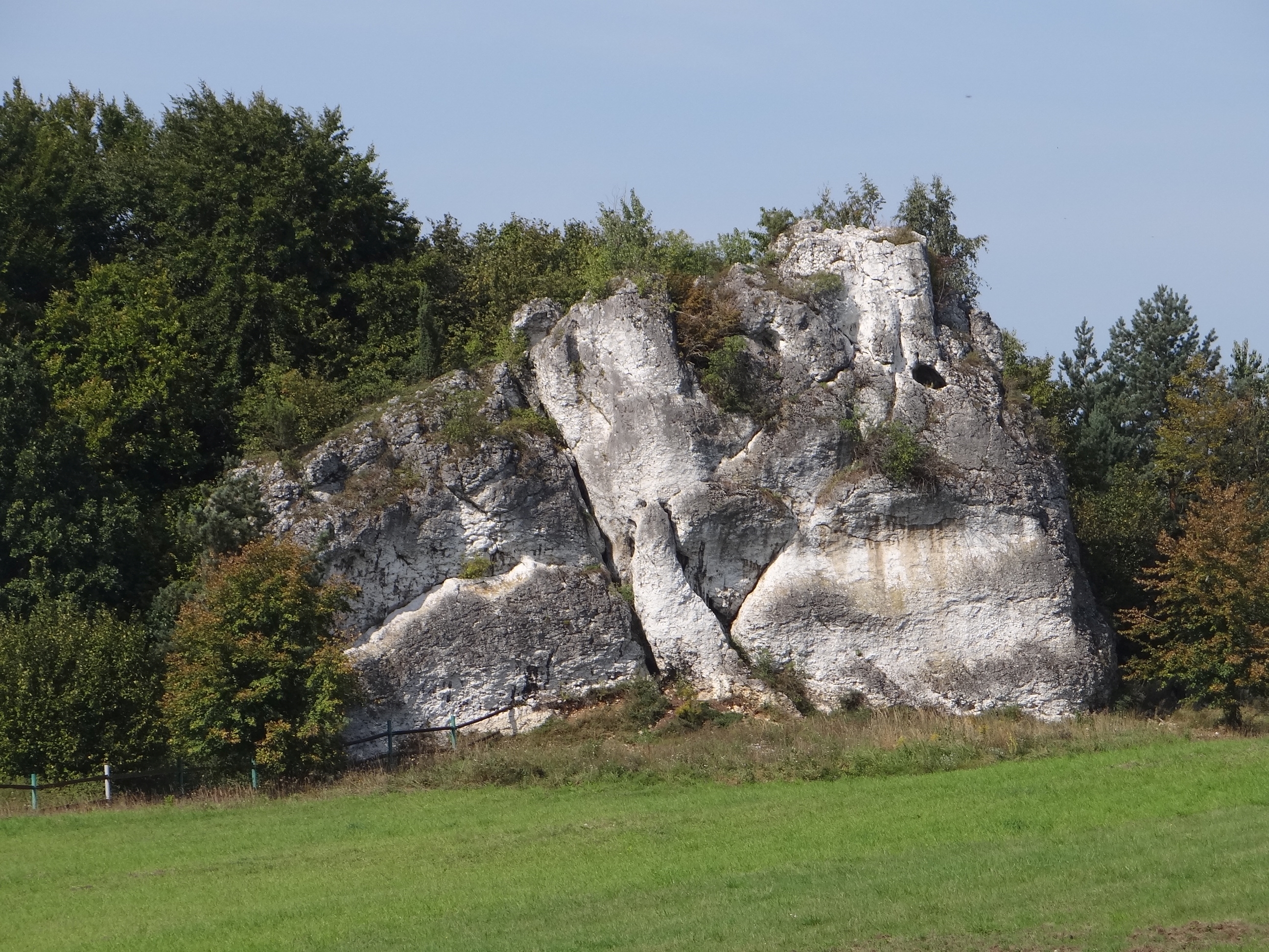 Skała Sitowna w Ryczowie-Kolonia